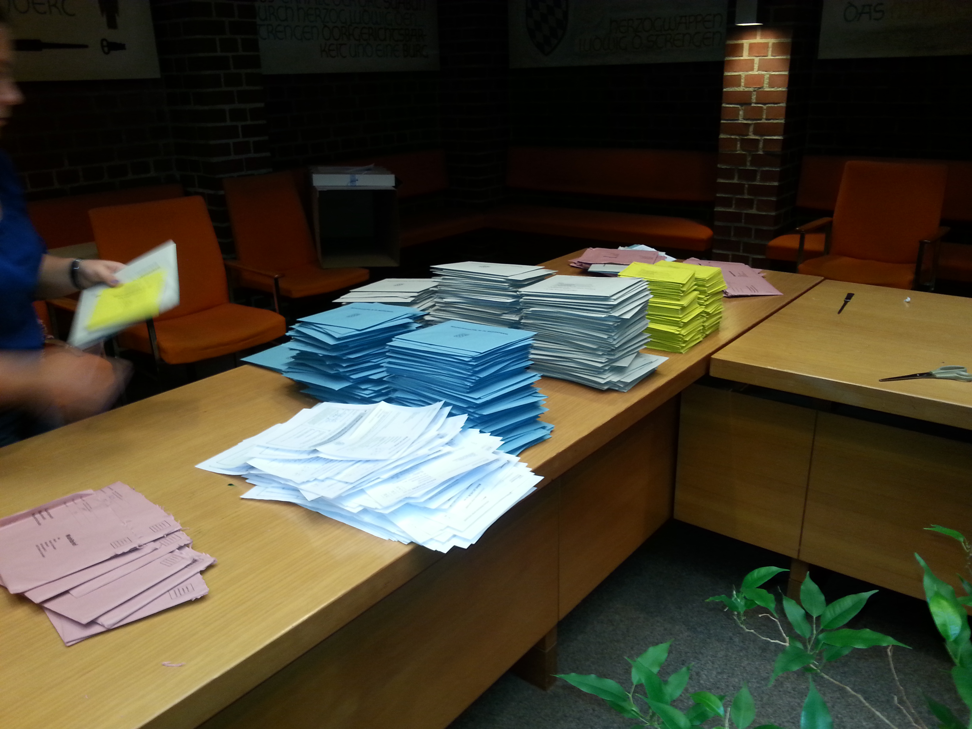 Auszählen der Stimmen bei der bayrischen Landtags- und Bezirkswahl und der Volksabstimmung 2013